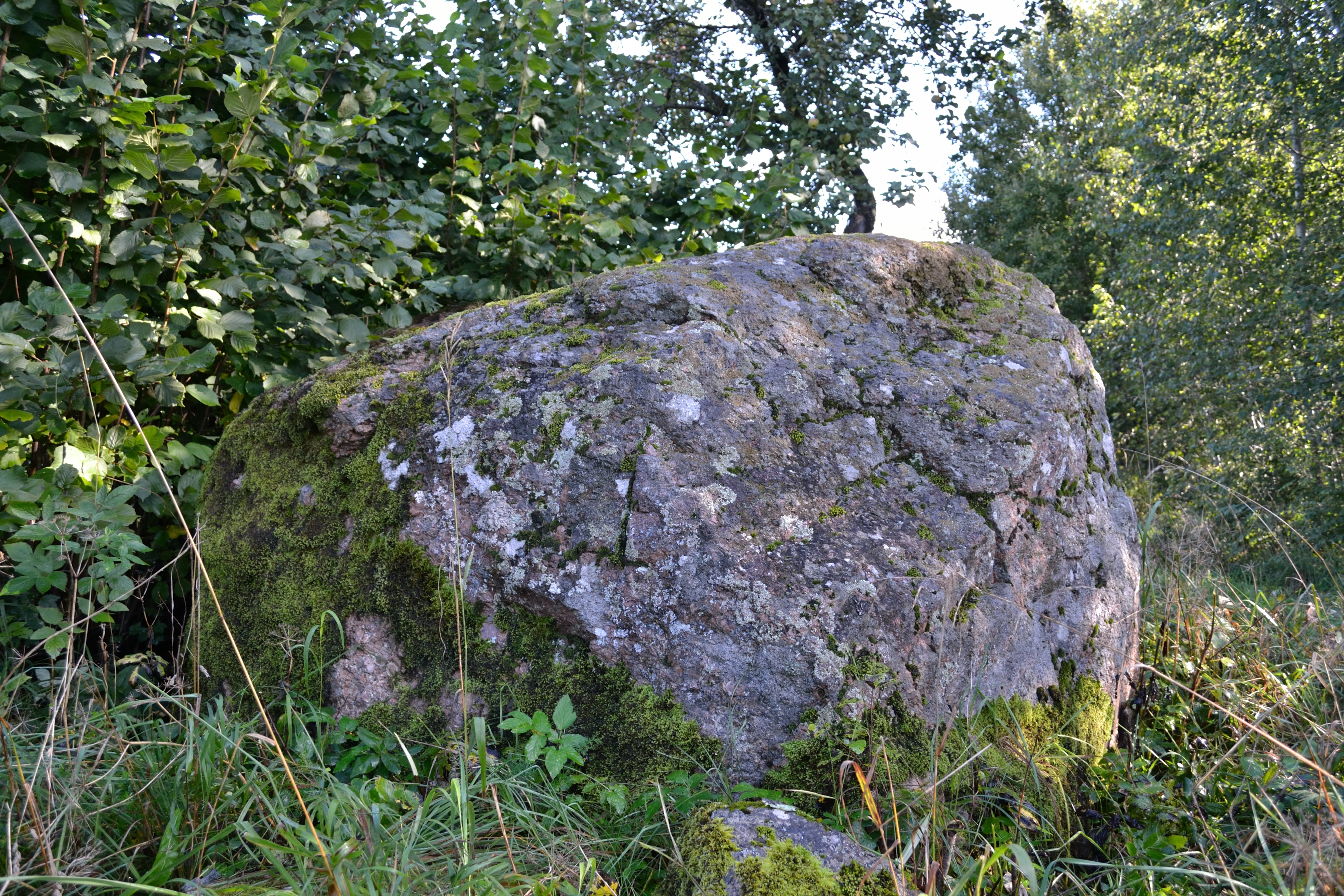 Kultusekivi, Saue vald, Valingu küla Kasepõllu